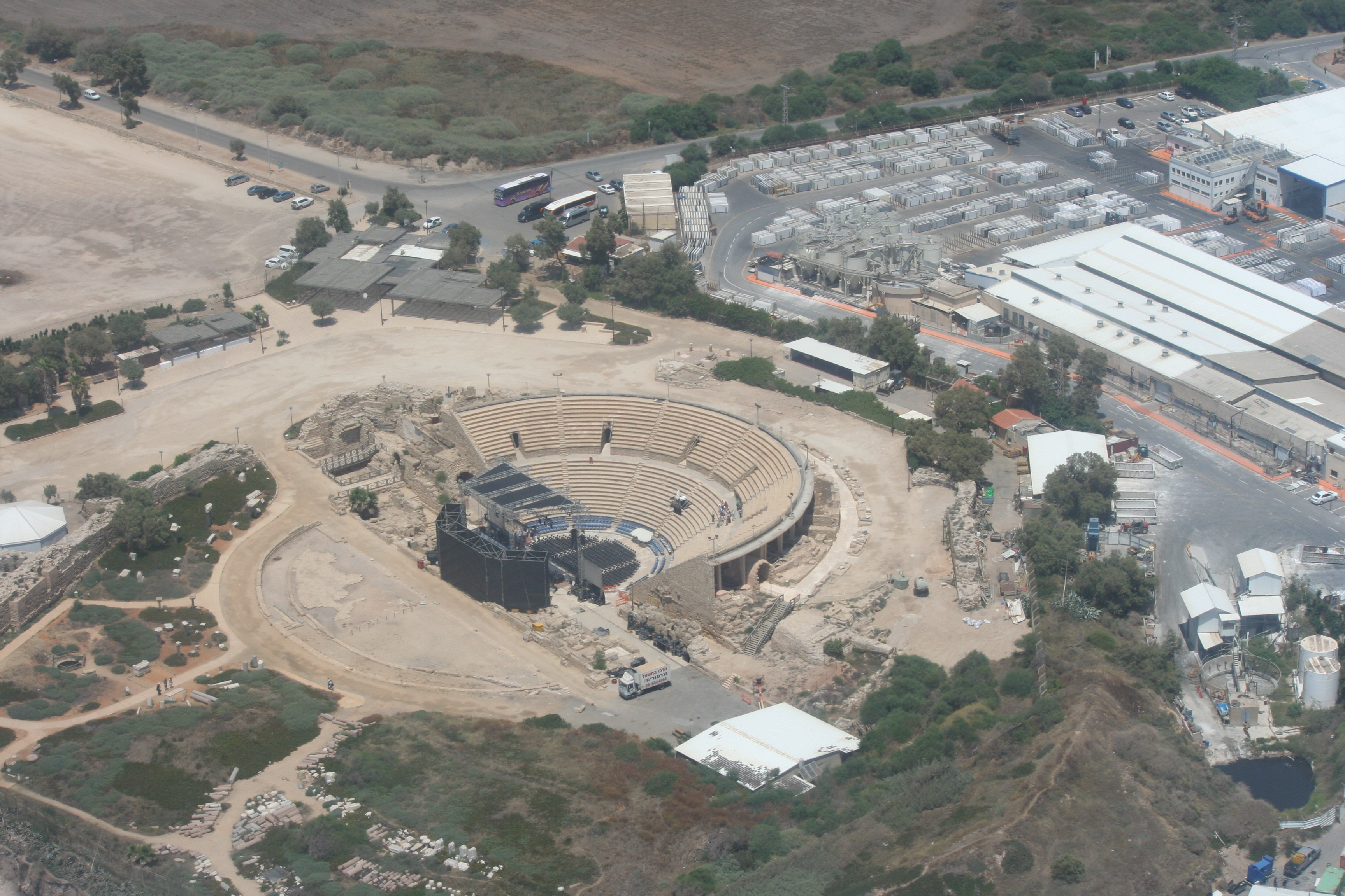 אמפיתאטרון קיסריה, מפעל אבן קיסר - שדות ים